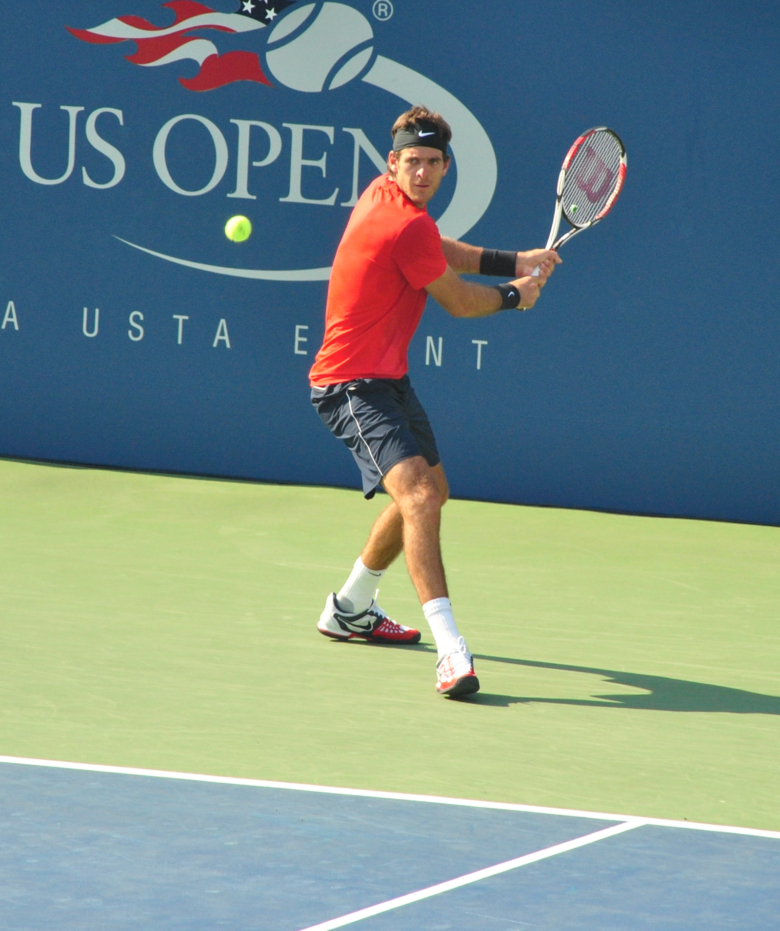 Juan Martín Del Potro jugando el Abierto de los Estados Unidos 2013.